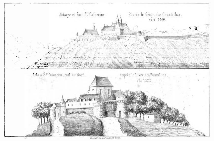 Vues de l'abbaye Sainte-Catherine-du-Mont à Rouen.